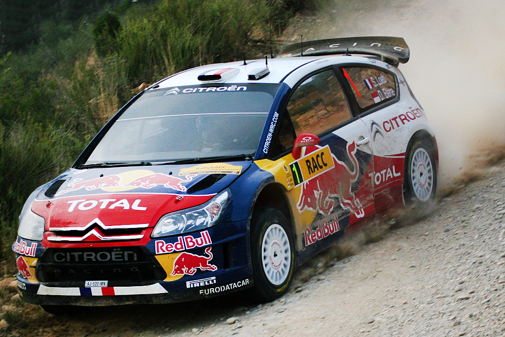 Loeb - Elena Rally Catalunya 2010